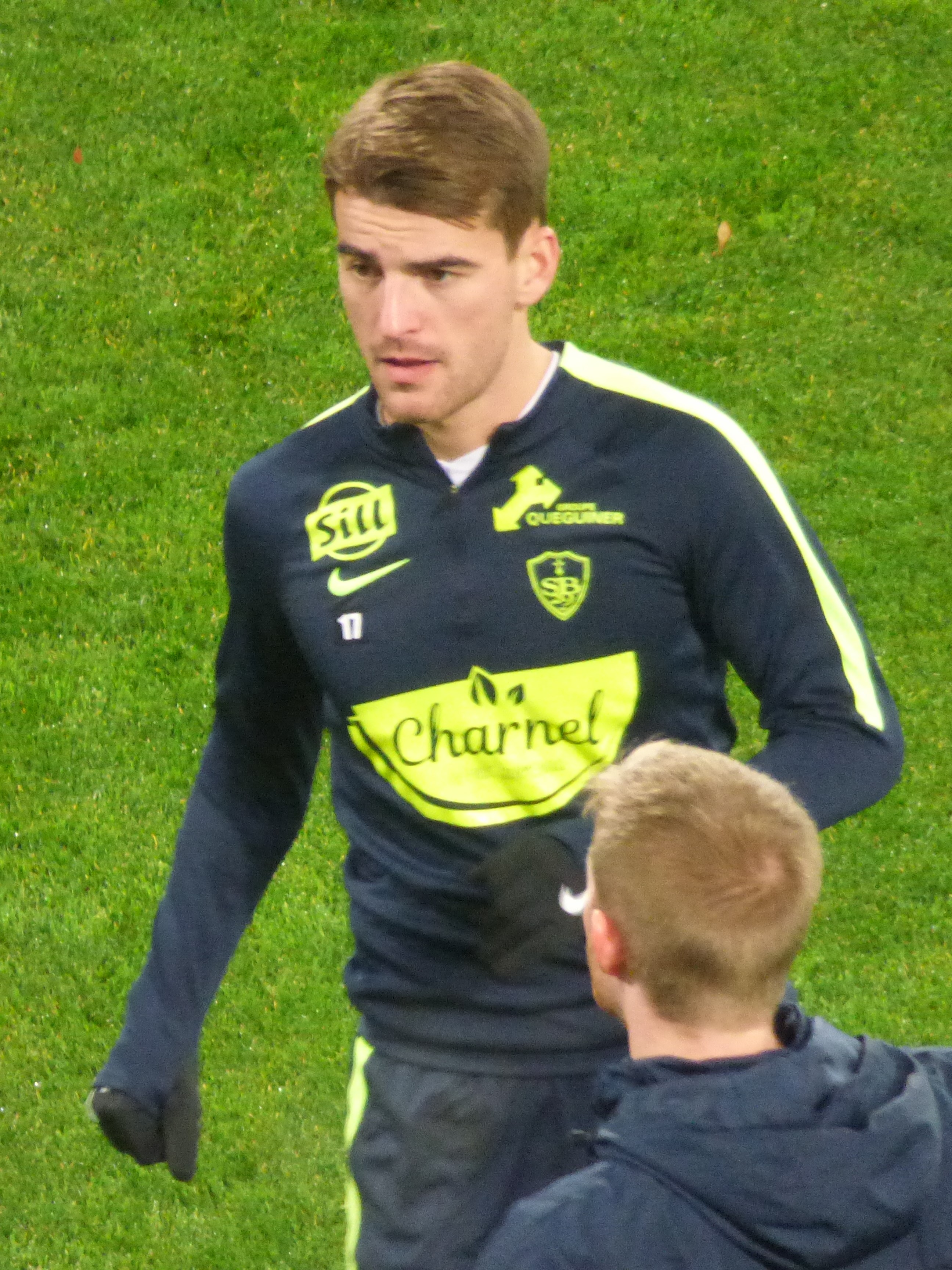 Valentin Henry avant le match RC Lens / Stade brestois, le 4 décembre 2018, comptant pour la dix-septième journée du championnat de France de football de Ligue 2 2018-2019, au Stade Bollaert-Delelis.